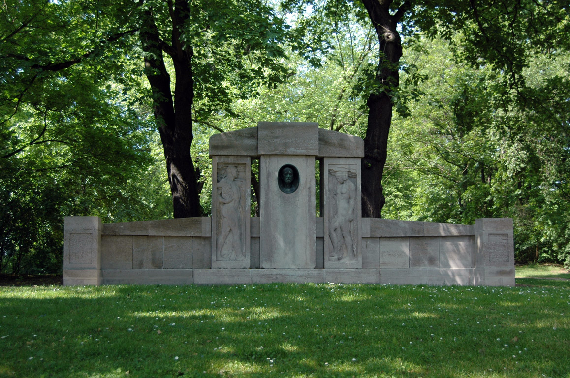 Denkmal für Richard Breslau, Oberbürgermeister von Erfurt zwischen 1872 und 1889 Bildhauer: Carl Melville (1875-1957), aufgestellt 1912